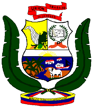 Escudo del Municipio Francisco Javier Pulgar del Estado Zulia, Venezuela